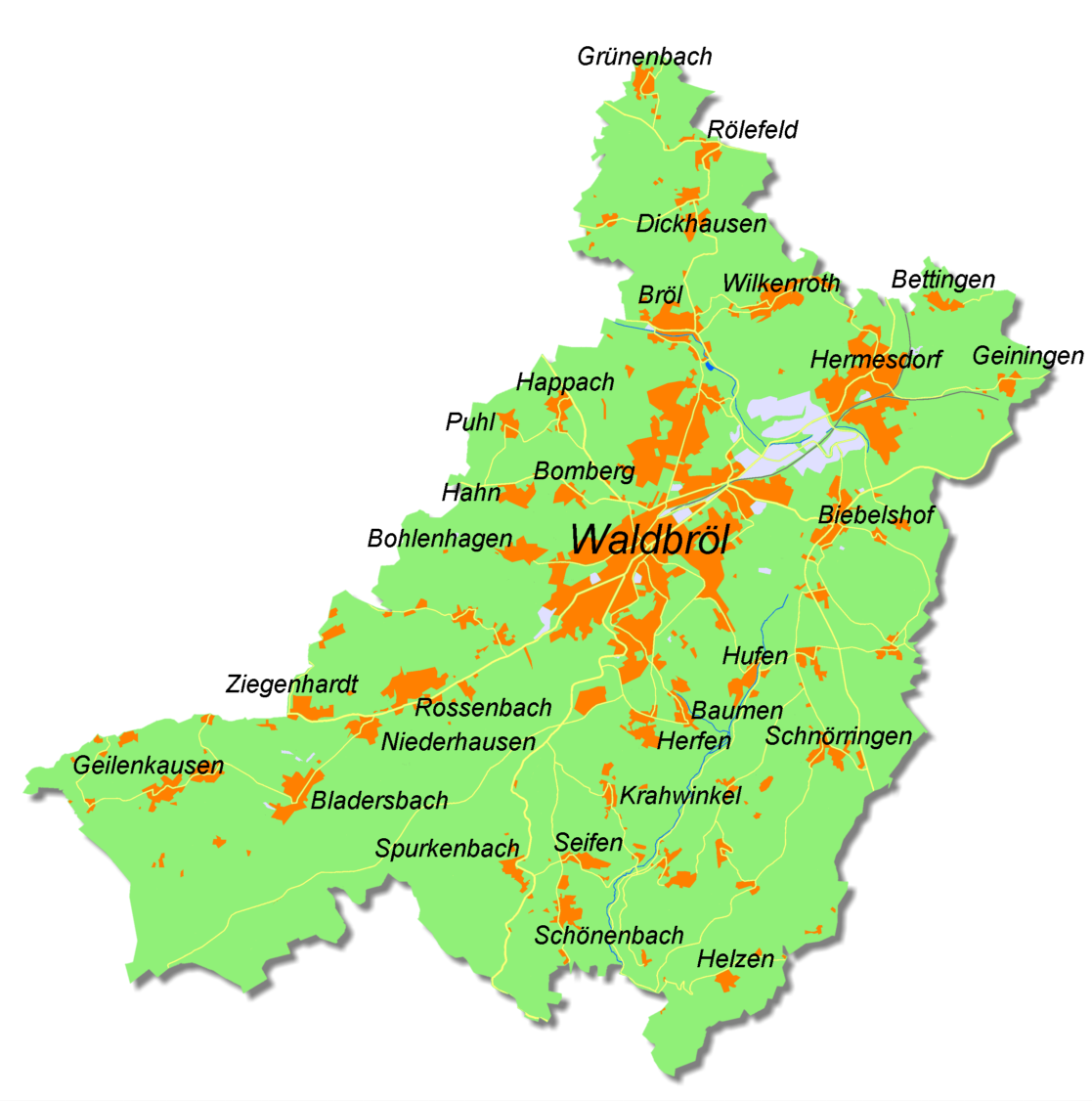 Karte von Waldbröl im Oberbergischen Kreis